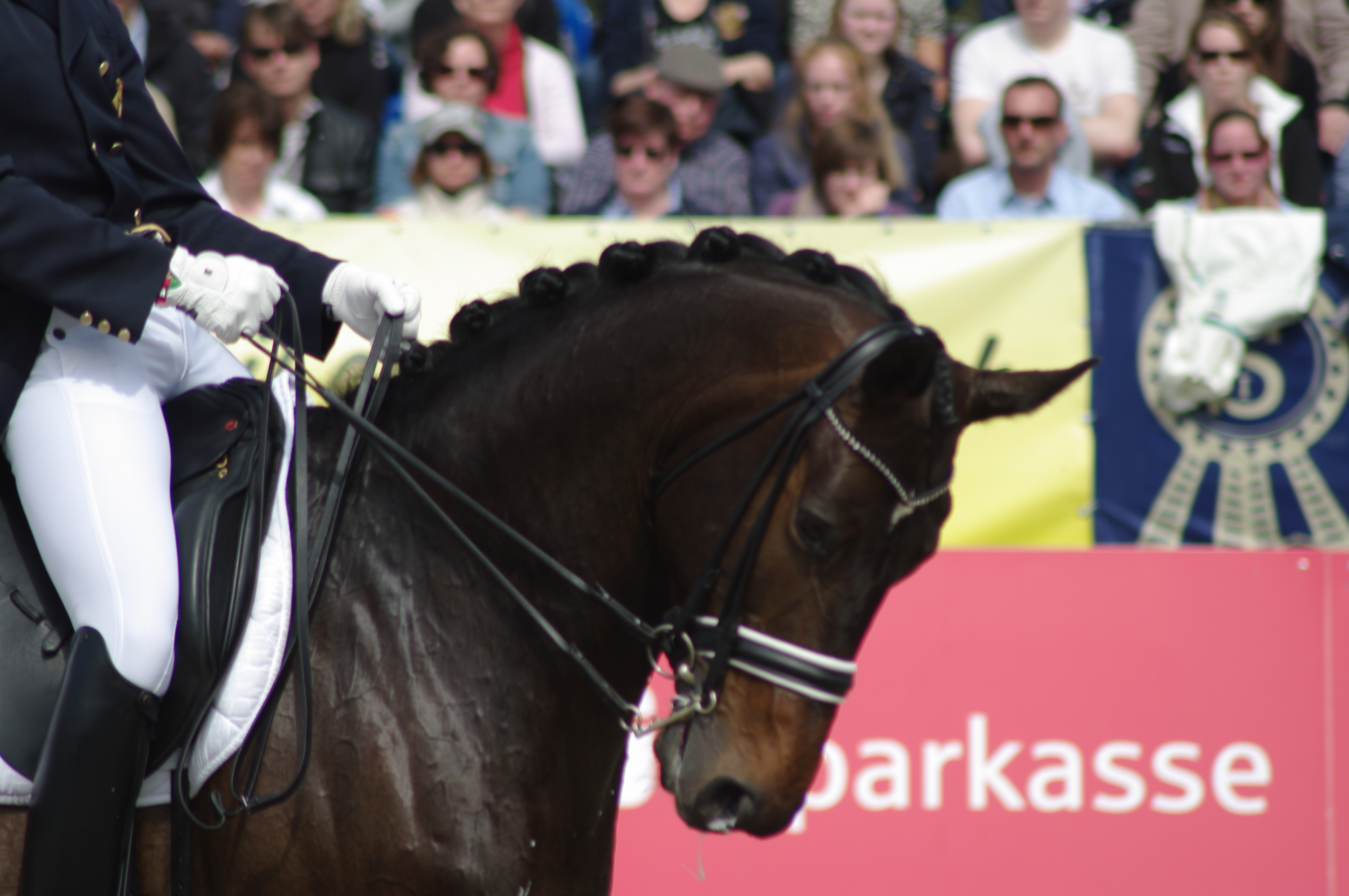 Horses & Dreams 2013: Nr. 6 CDI4* FEI Grand Prix Kür (Preis der Firma Ullrich Equine international GmbH - "in Memoriam George Theodorescu") Simon Missiaen mit "Vradin"